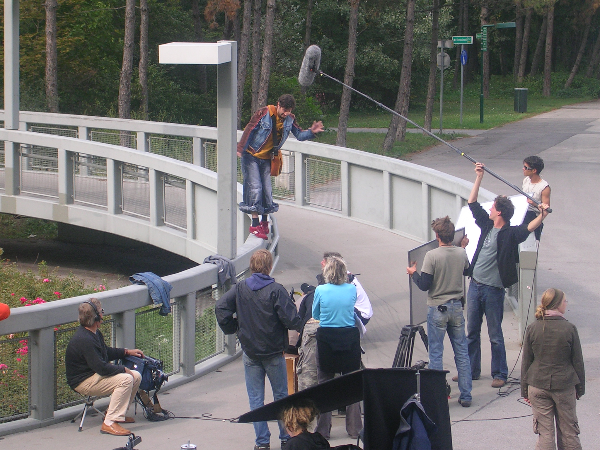 Dreharbeiten für Tom Turbo in der Donaucity